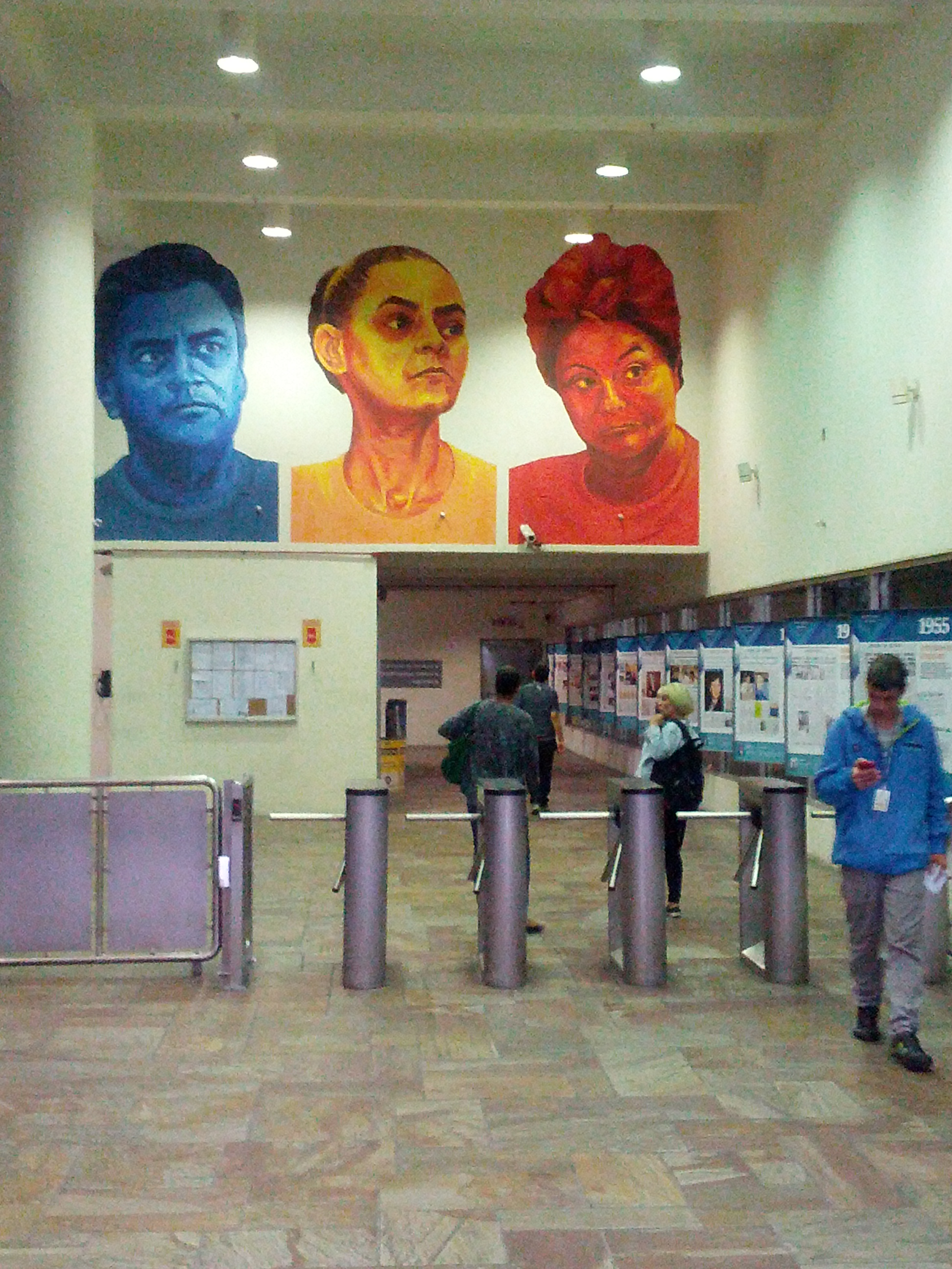 Foto tirada na entrada do jornal Folha de S.Paulo nas vésperas do 1º turno das eleições 2014. Pintura retrata os 3 principais candidatos a presidência.